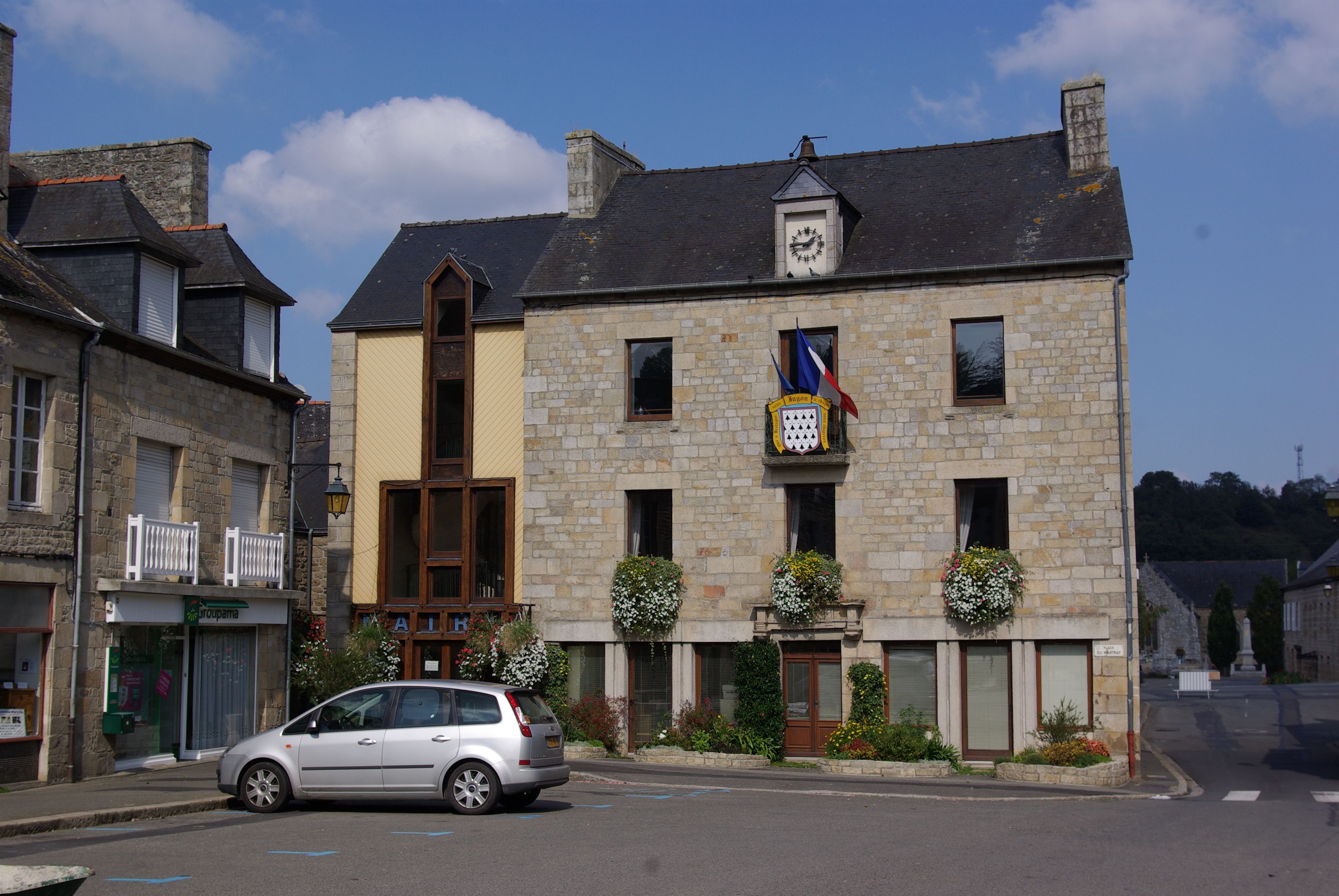 Jugon les Lacs in der Bretagne, Frankreich. Das Rathaus (Marie) an dem Marktplatz (geotags in den EXIF-Daten). Am Rathaus ist das Wappen sichtbar.